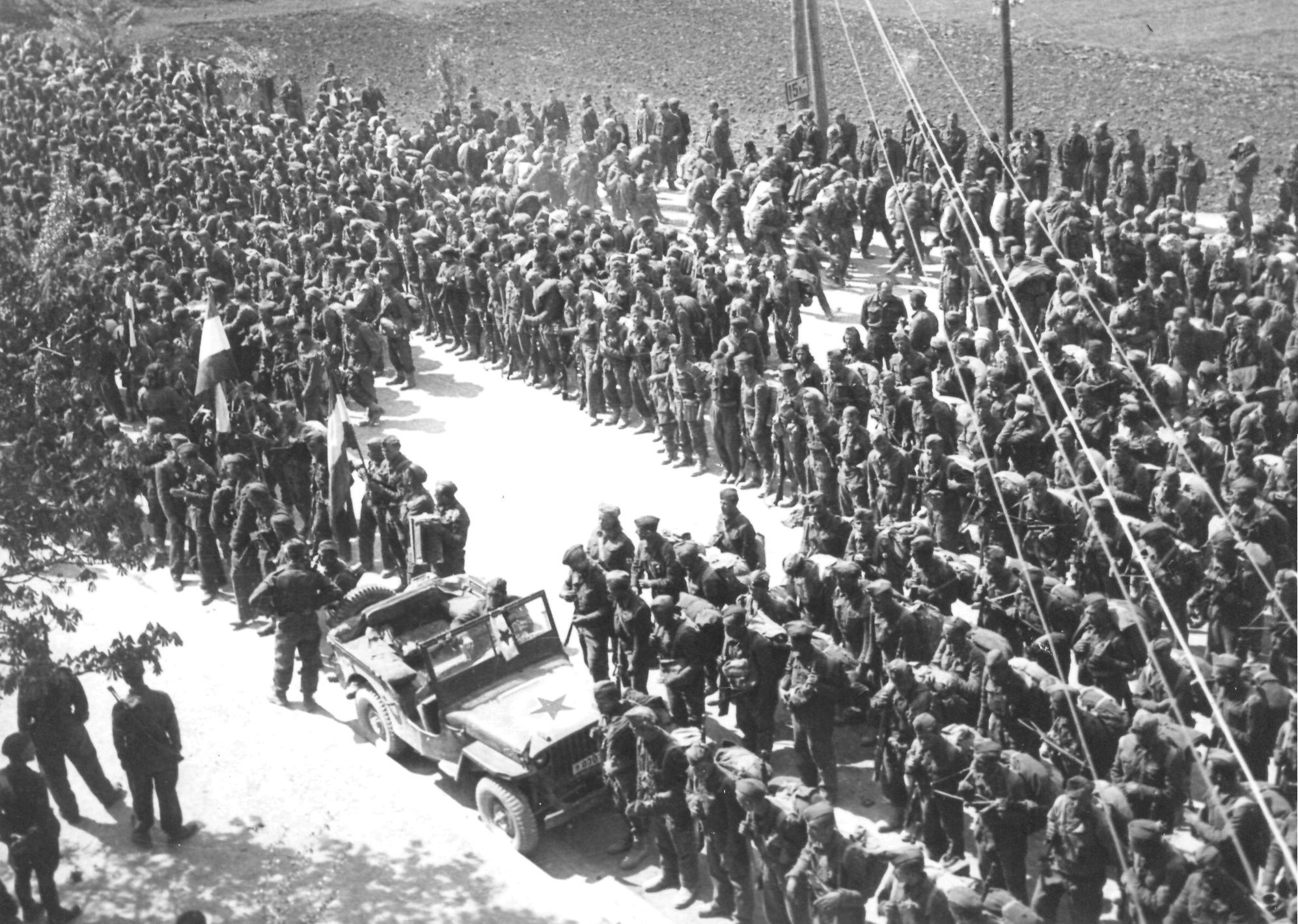 Borci pete prekomorske brigade v Sloveniji.